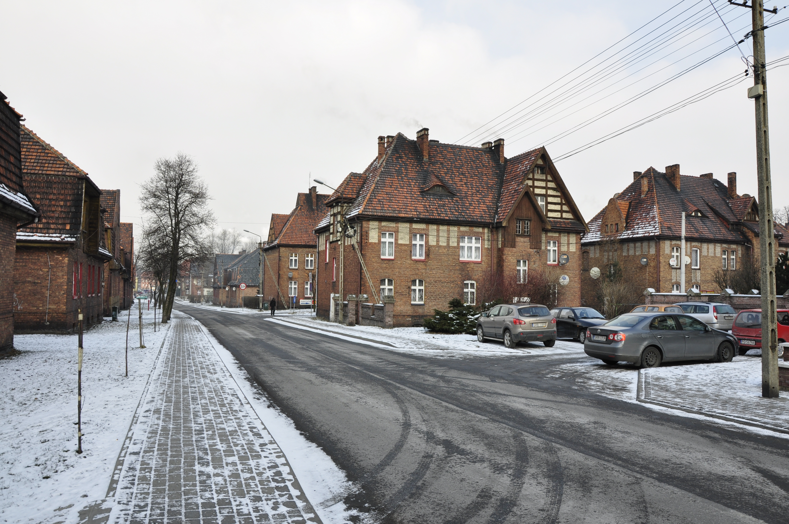 Czerwionka Leszczyny, ul. Wolności. Tradycyjne śląskie familoki.